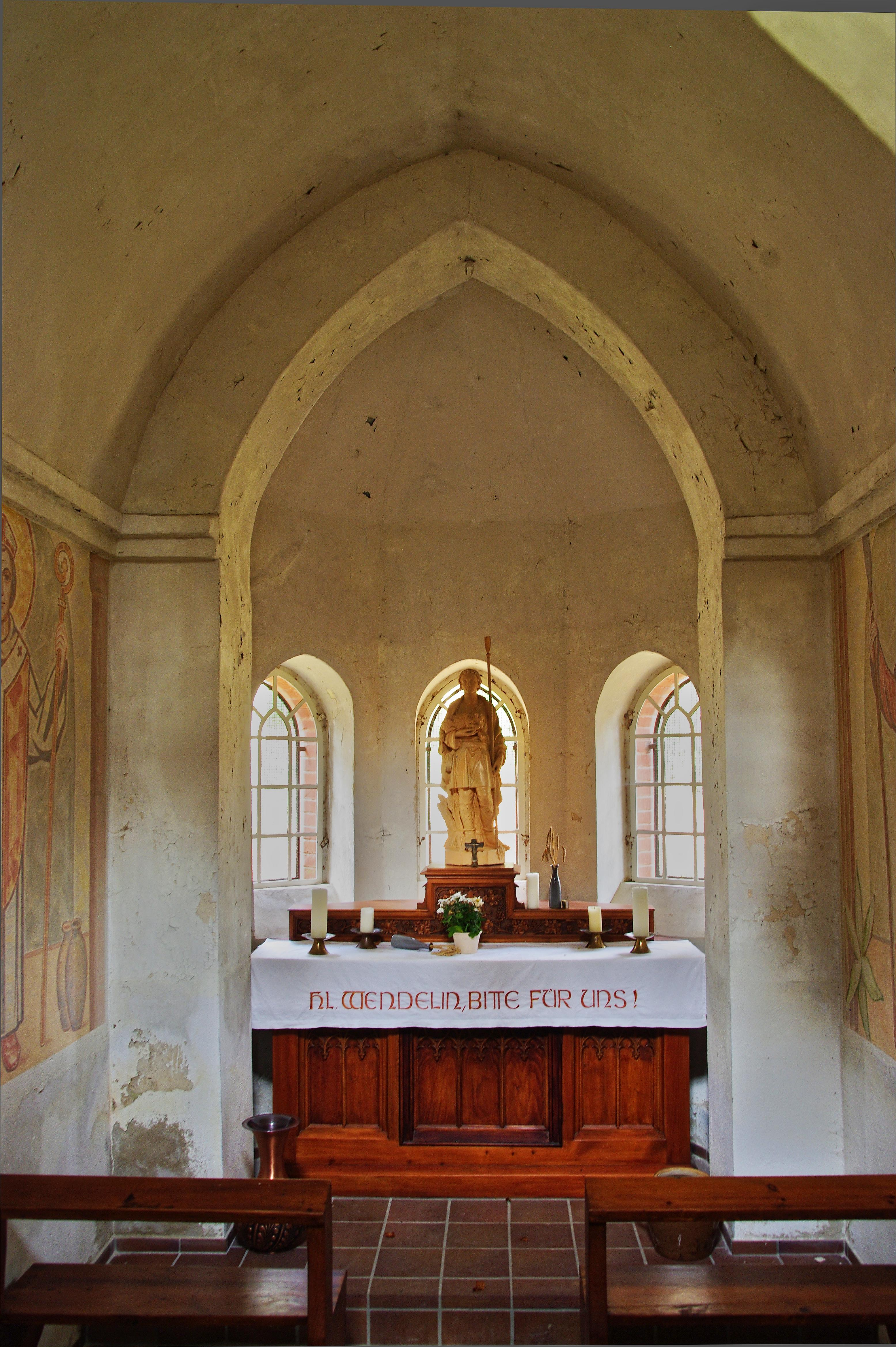 St-Wendelin-Kapelle Freiburg im Breisgau: Der Altar